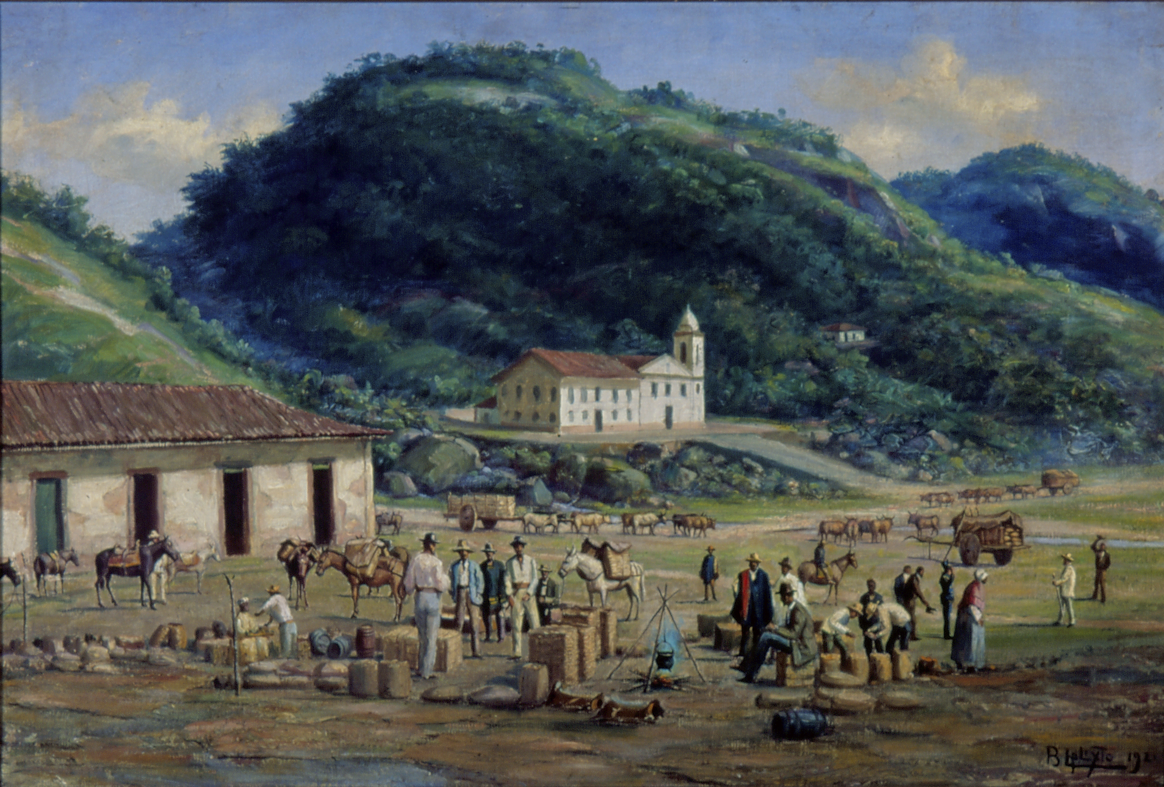 Obra que integra o acervo do Museu Paulista da USP. Coleção Benedito Calixto de Jesus - CBCJ